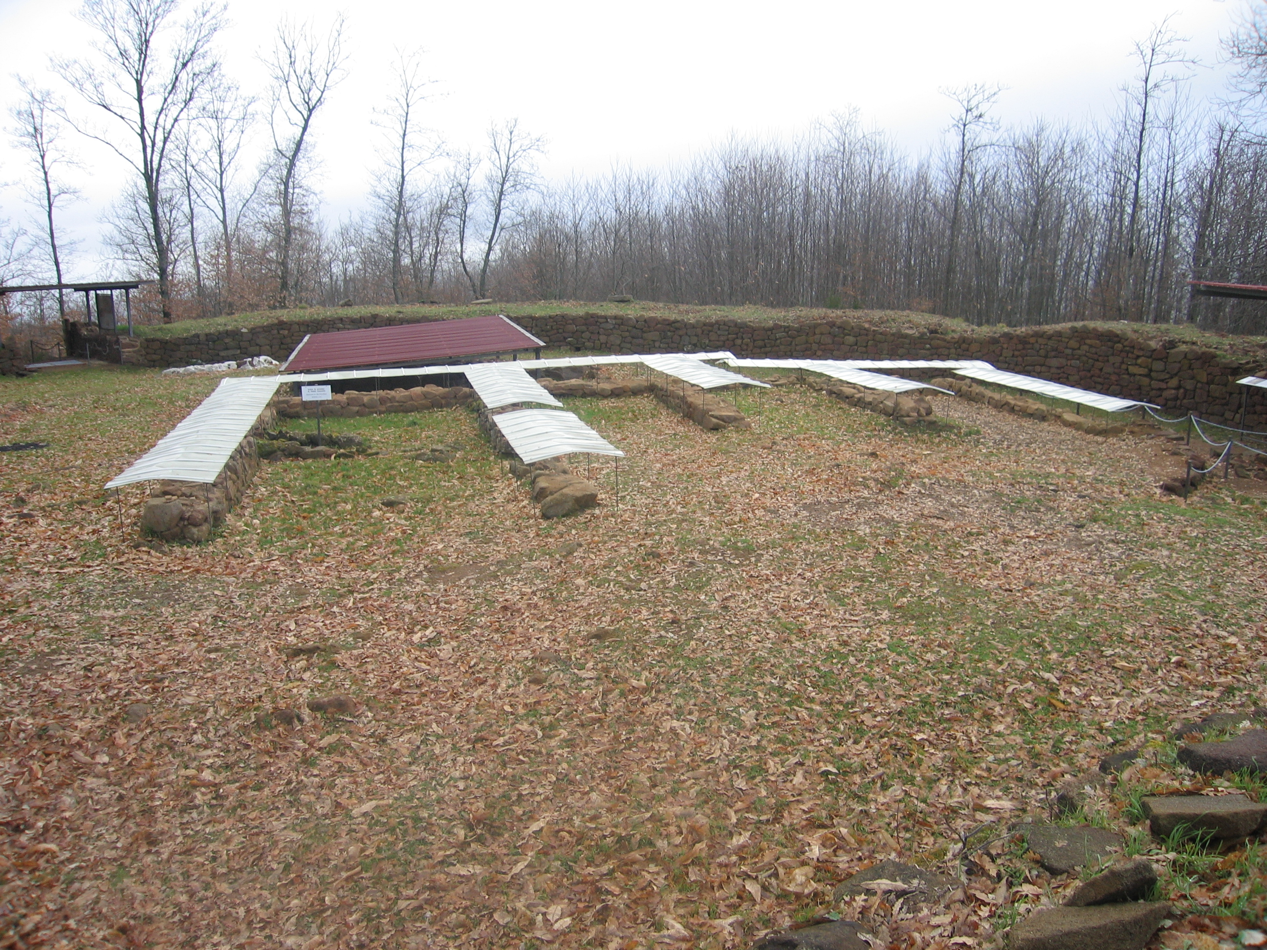 Il Parco Archeologico di Poggio Civitella nel 2008